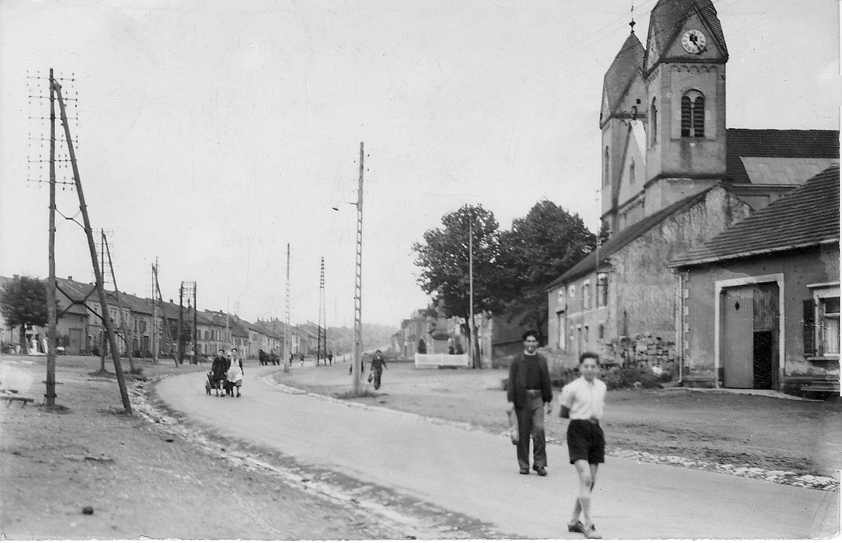 Photo ancienne de la rue Principale à Carling (prise avant la seconde guerre mondiale)